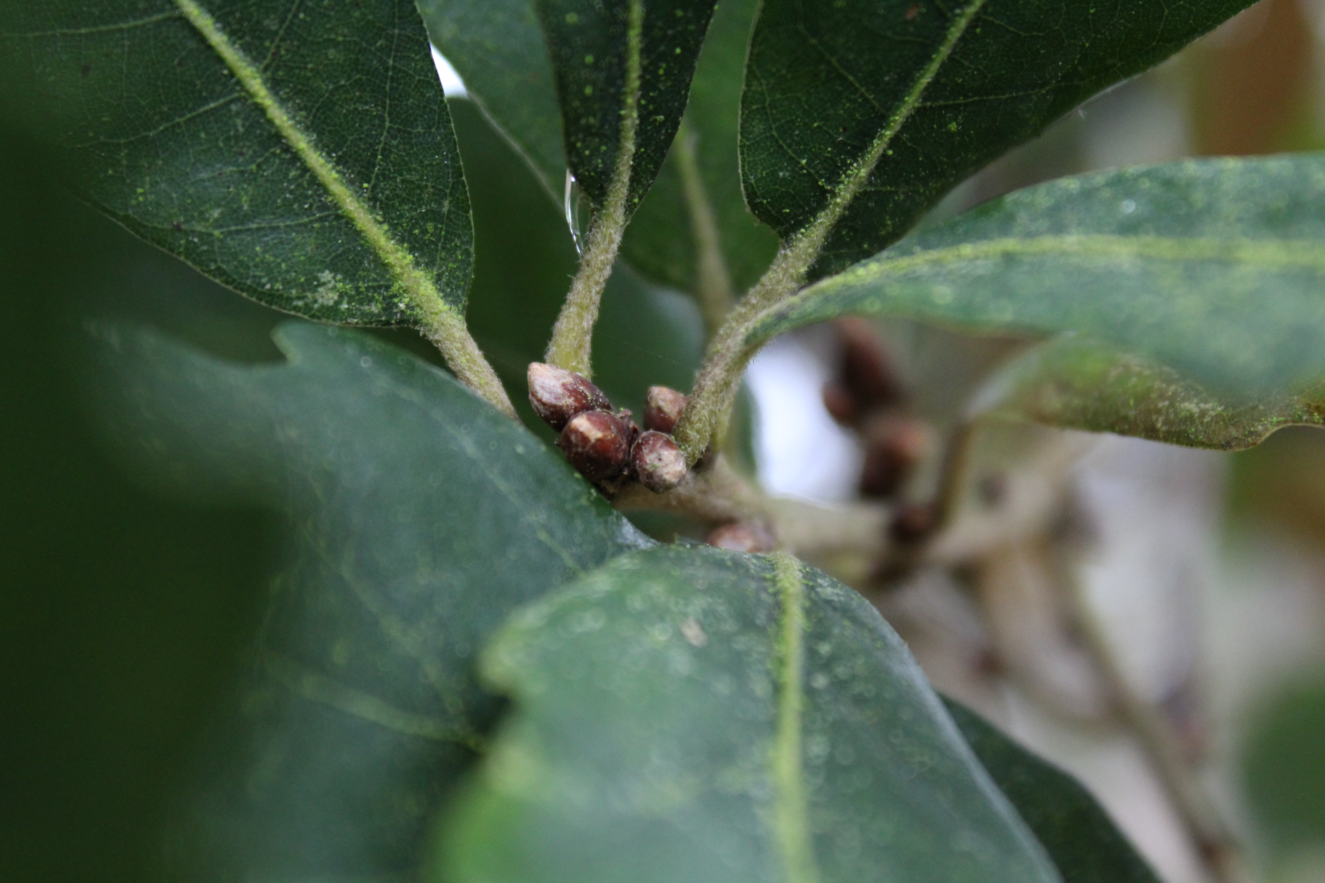 Knospen der Immergrünen Eiche